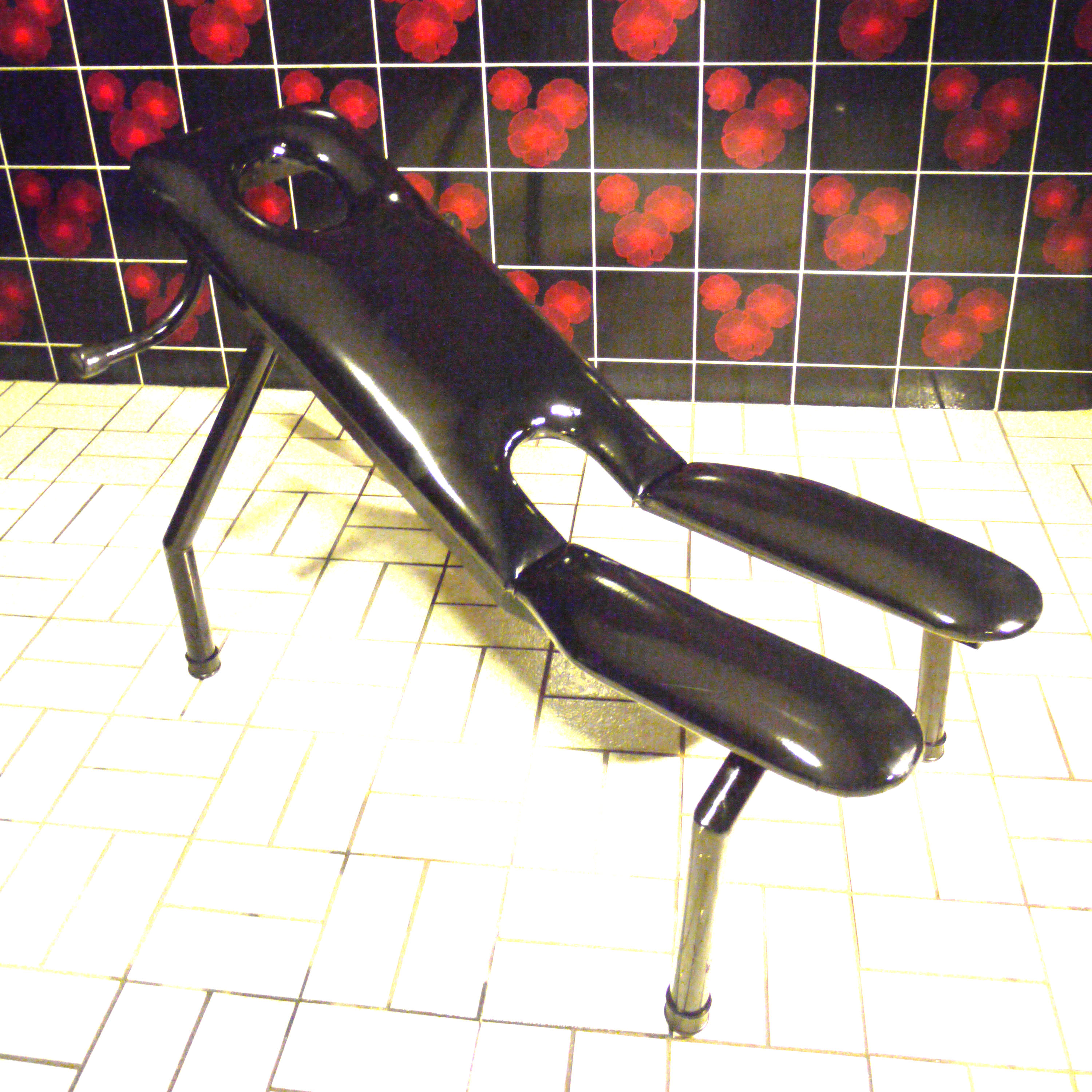 投稿者が撮影